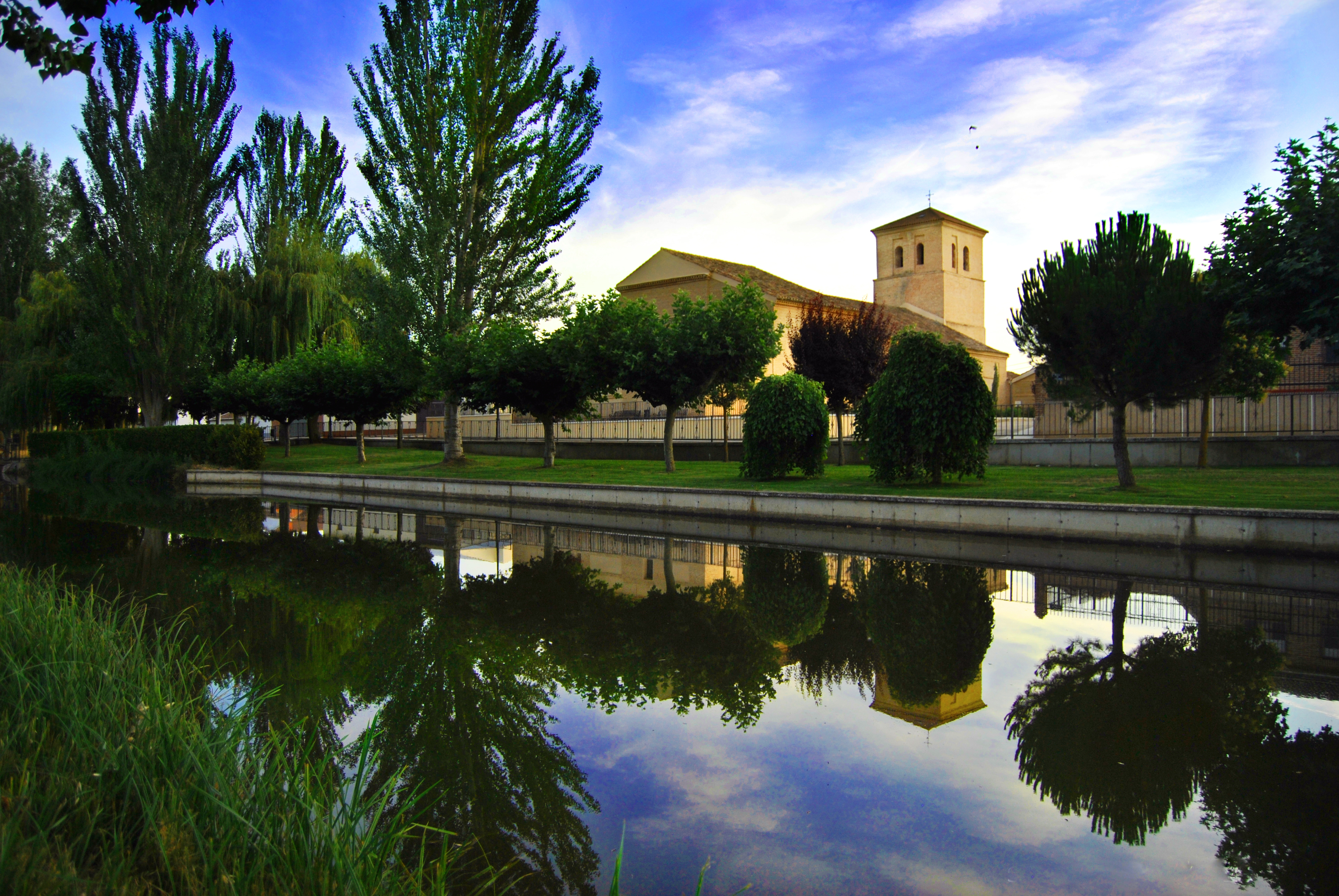 IGLESIA de Santiago, vista desde el otro lado del cuérnago de La Perionda